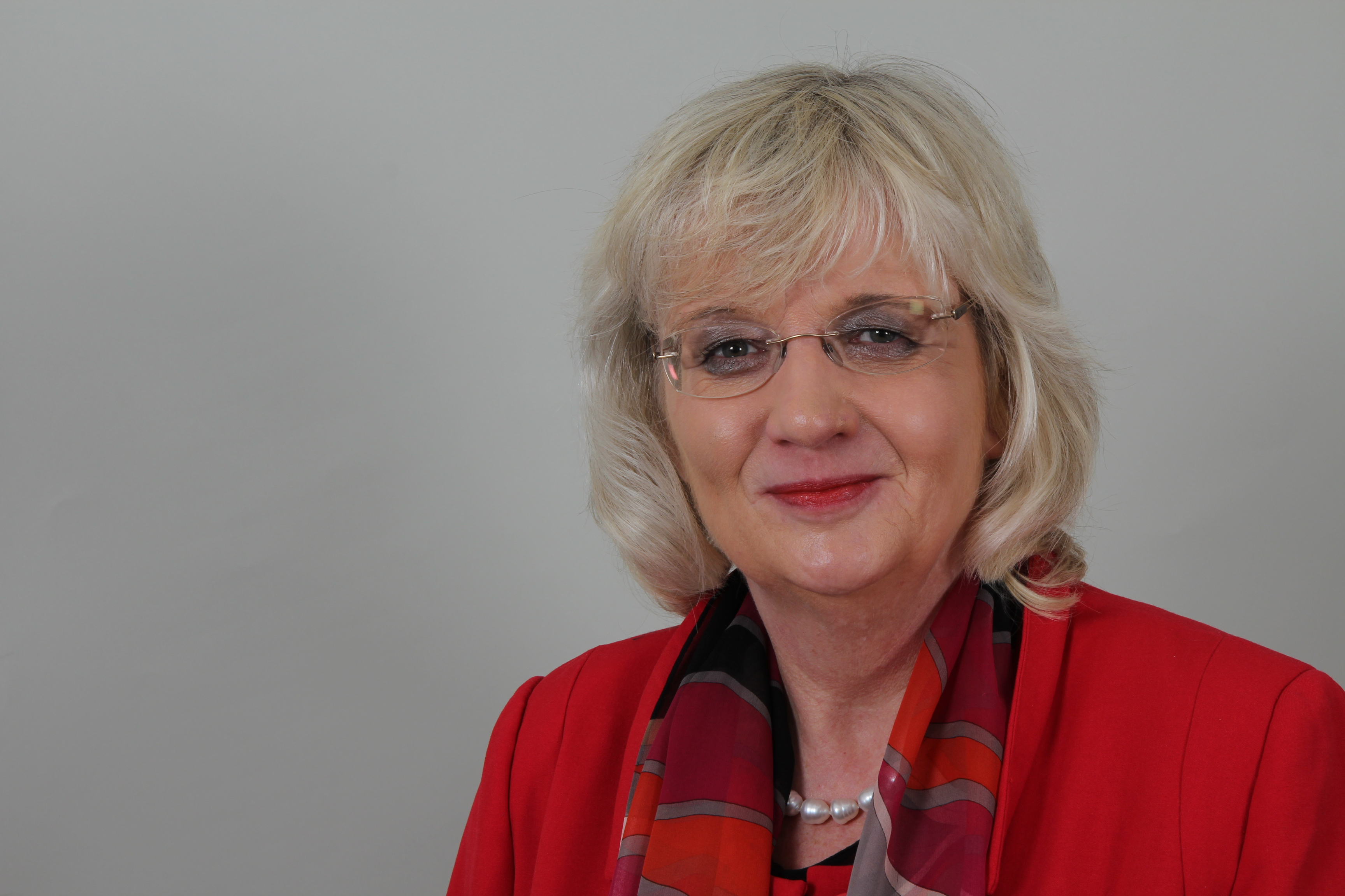 Petra Müller-Klepper, hessische Politikerin (CDU) und hessische Sozialstaatssekretärin.